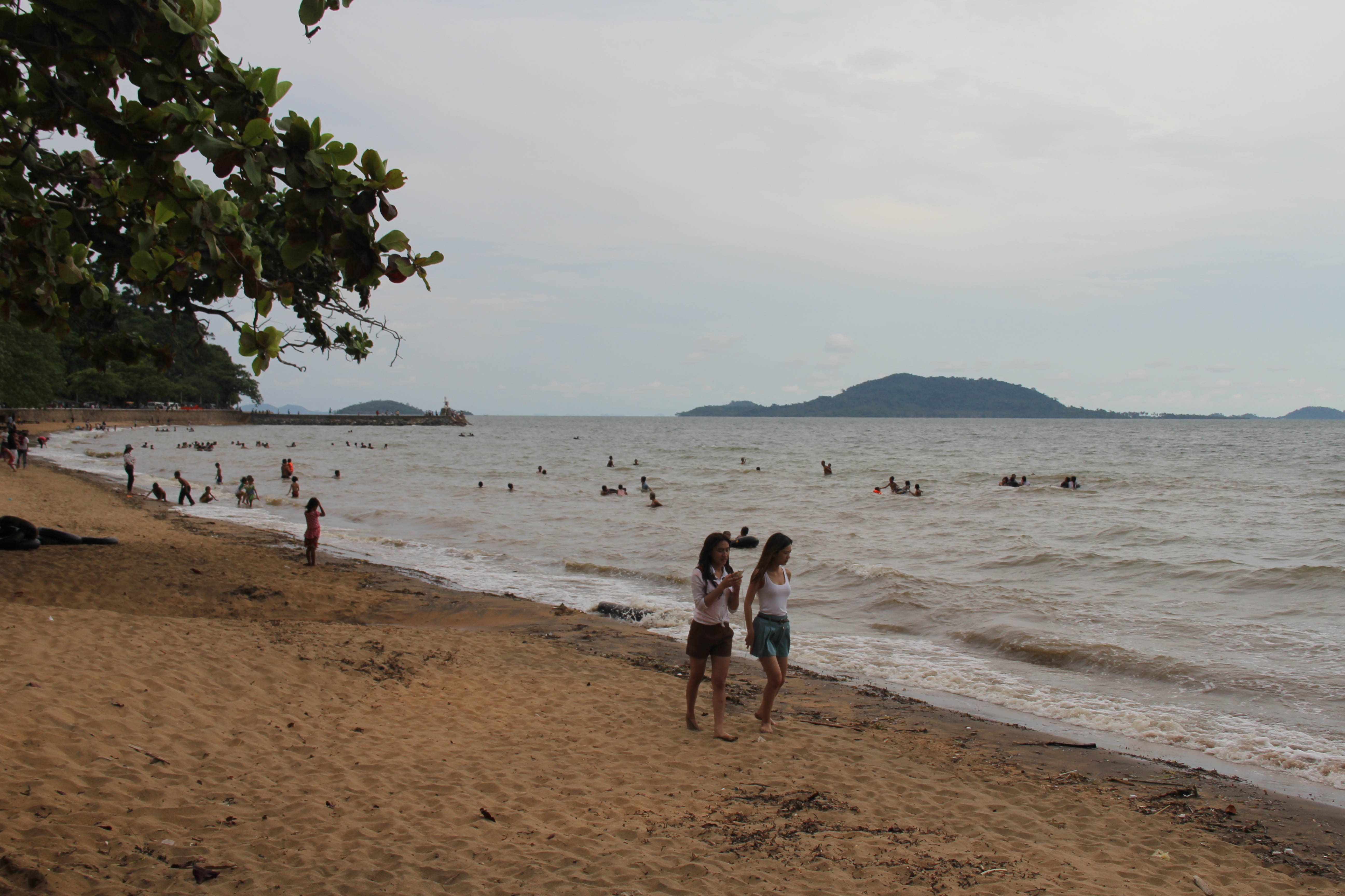 Kamboçya'nın güneyinde bulunan Kep Kasabası